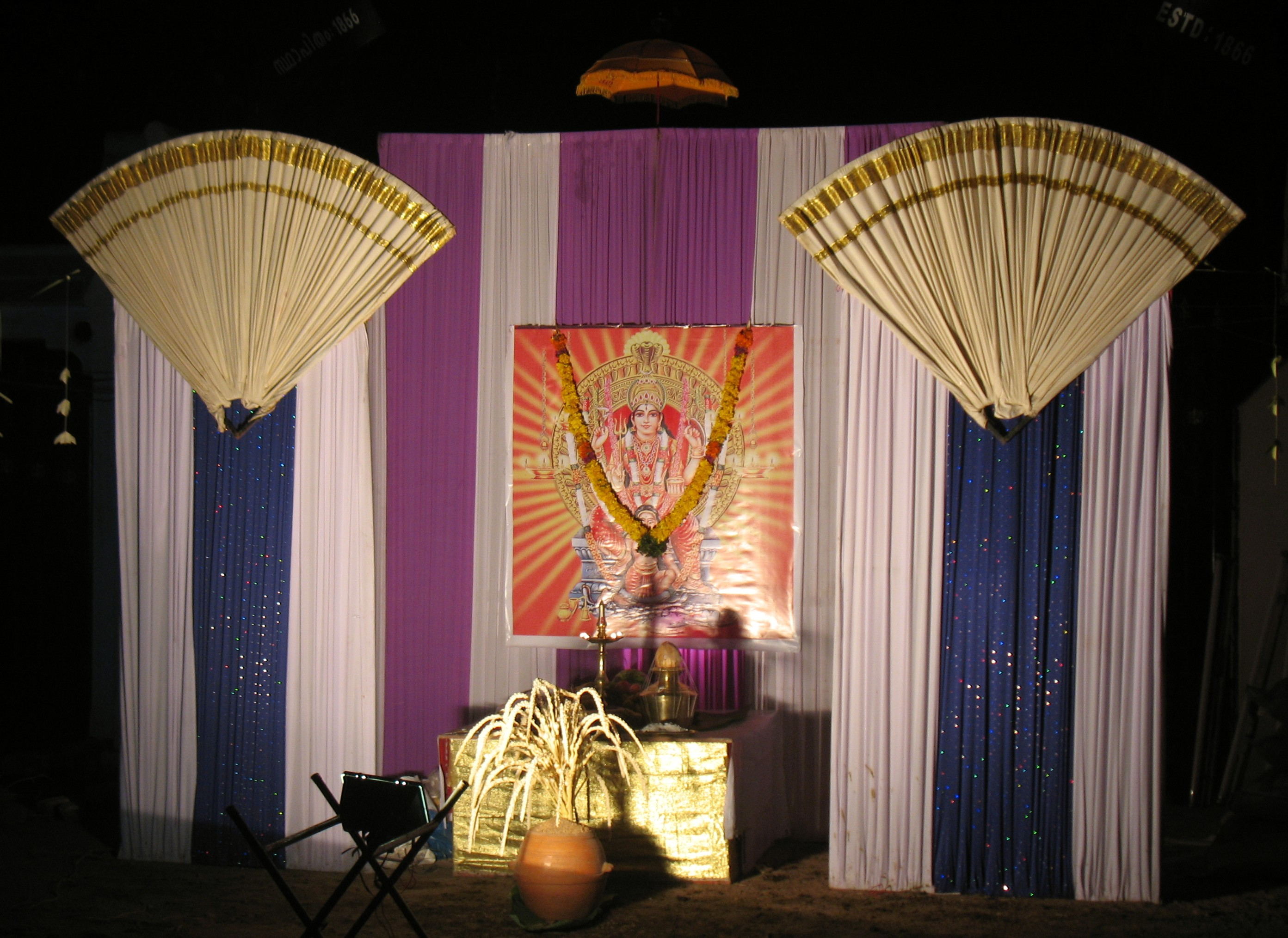 തിരുവനന്തപുരം യൂണിവേഴ്സിറ്റി കോളേജിനു സമീപത്ത് ആറ്റുകാൽ പൊങ്കാലയോടനുബന്ധിച്ച് നടത്തിയിരിക്കുന്ന വഴിയലങ്കാരം